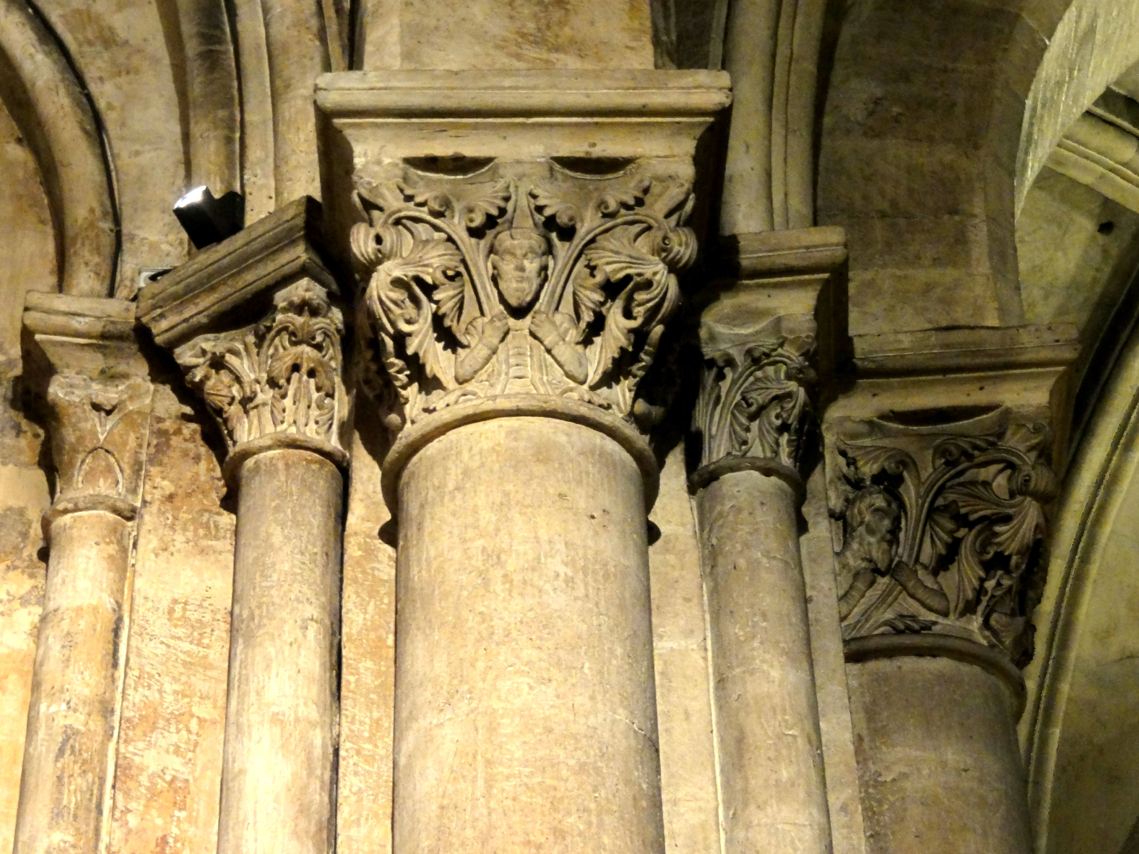 Chapelle St-Pierre-et-St-Paul, chapiteaux côté est.